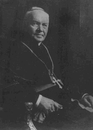 Wenzel Frind (1843 - 1932), Český římskokatolický kněz.